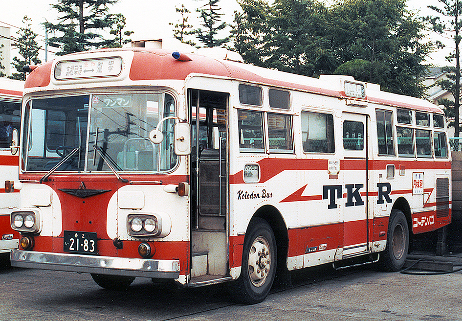 コトデンバス 三菱ふそうMR520 呉羽車体